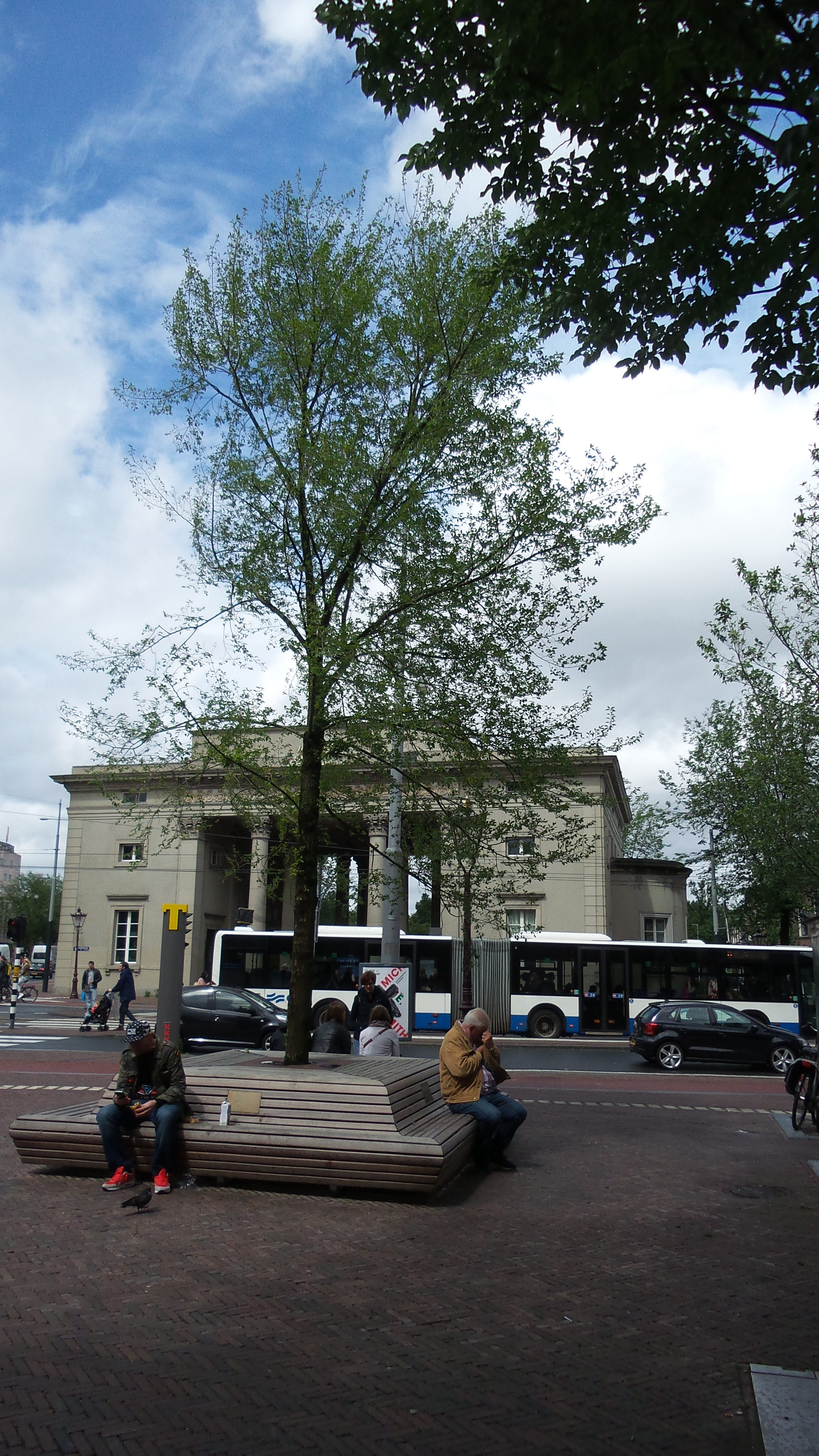 Iep als levend monument ter nagedachtenis aan het duurzame gedachtegoed van Nederlands eerste ruimtevaarder Wubbo Ockels. Geplaatst in 2014 op het Haarlemmerplein in Amsterdam